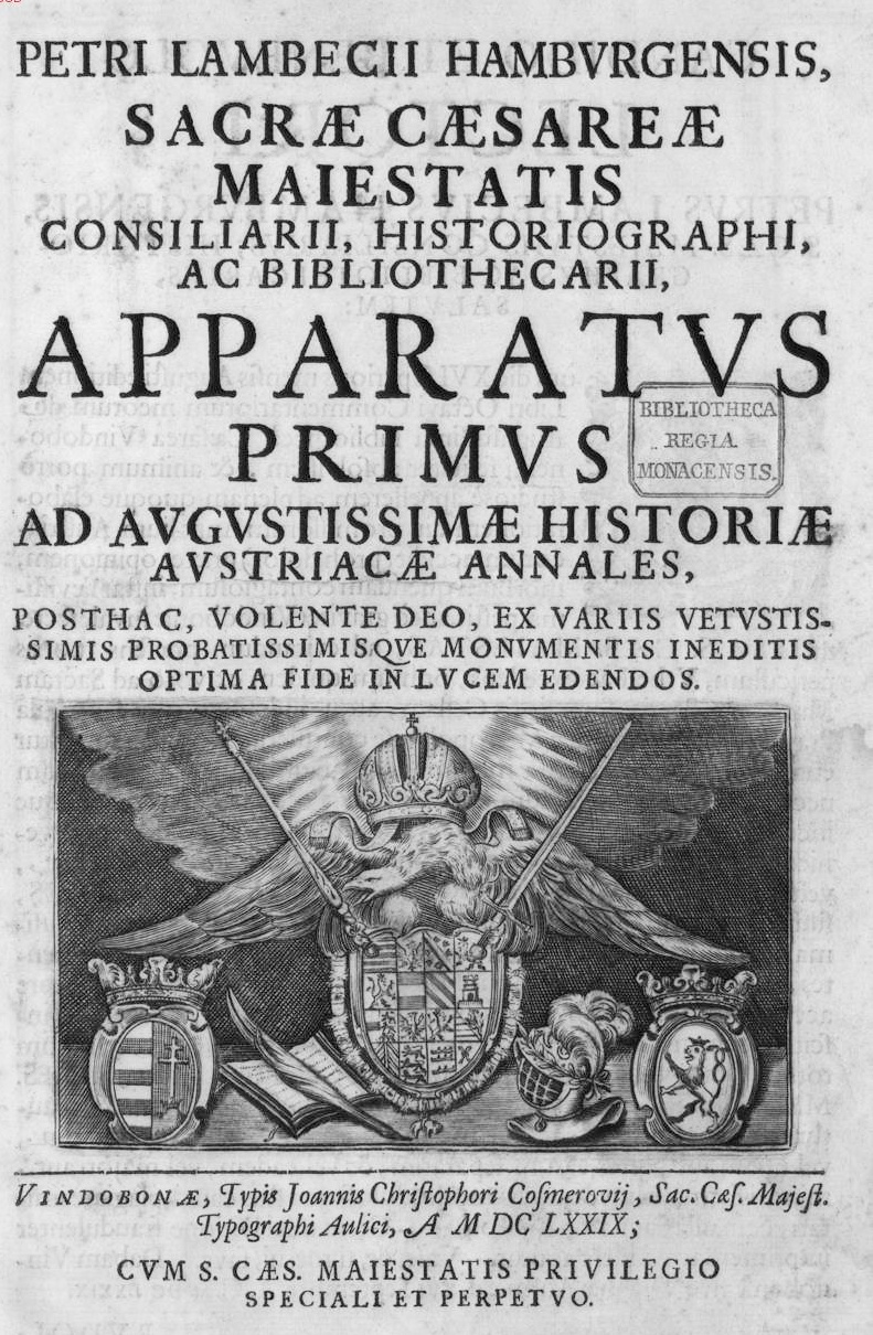 Peter Lambeck, Buchtitelseite